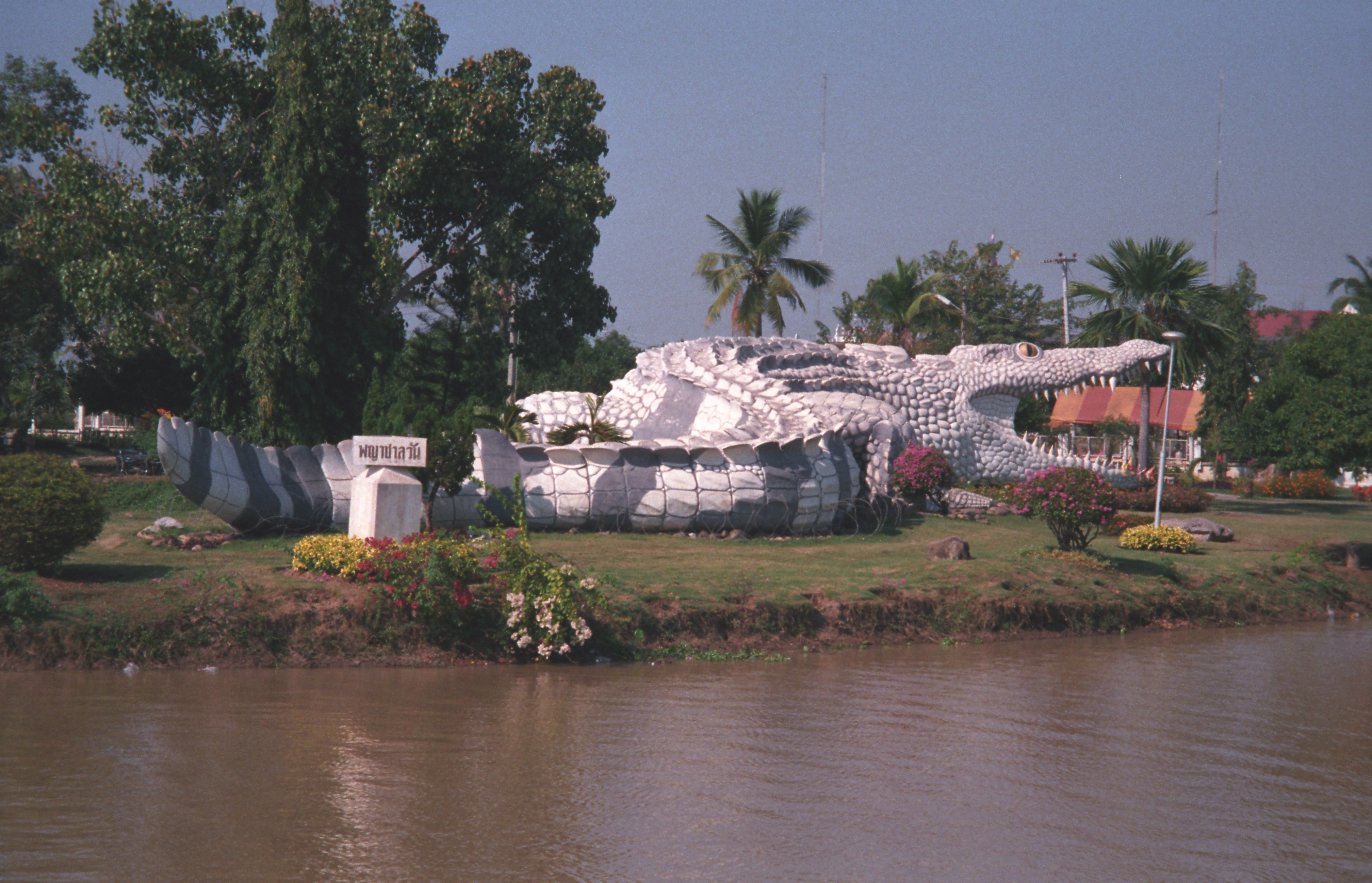 Skulptur Riesenkrokodil Pichit Thailand